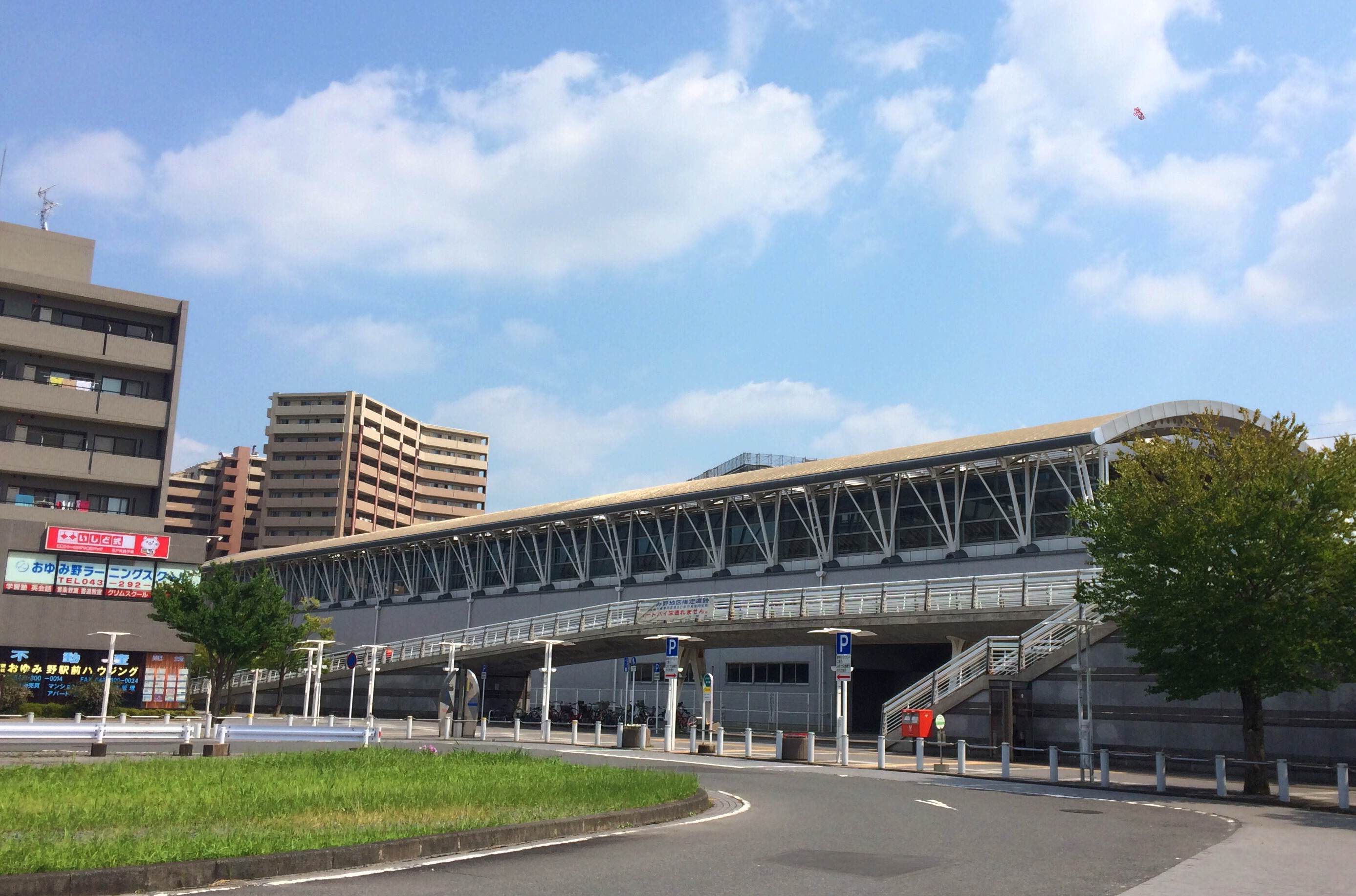 おゆみ野駅舎